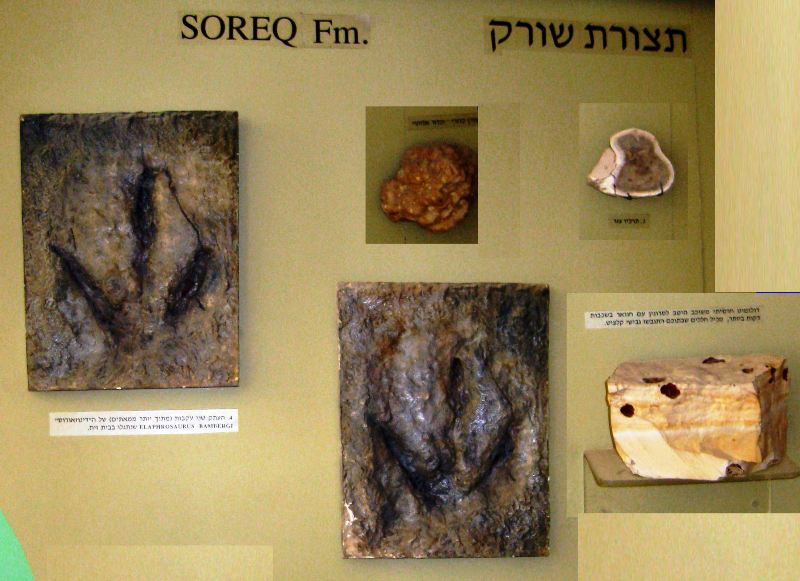 תצוגת סלעי תצורת שורק רישיון נוצר על ידי משתמש:Daniel Ventura